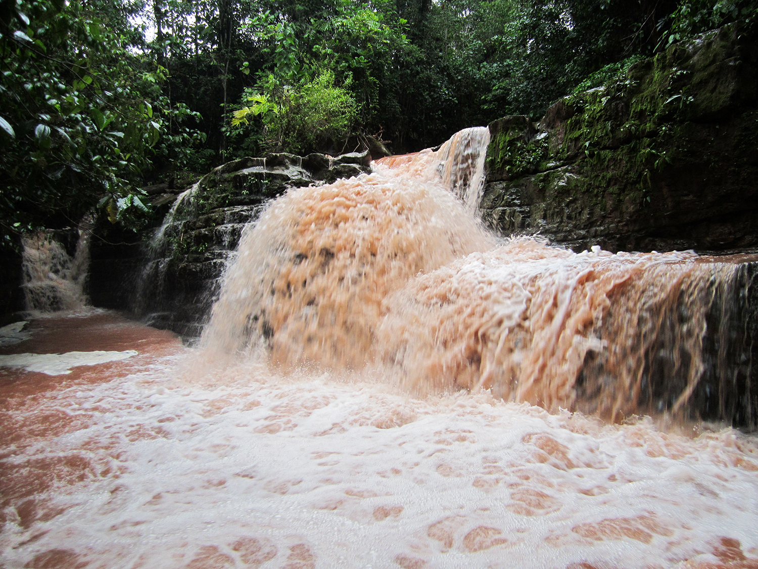 Cascada del cañón Dorado